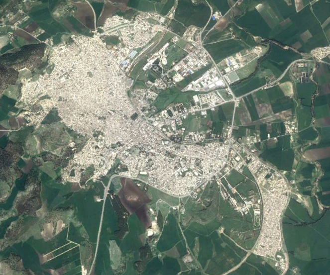 Image satellite du ville de Béja, Tunisie